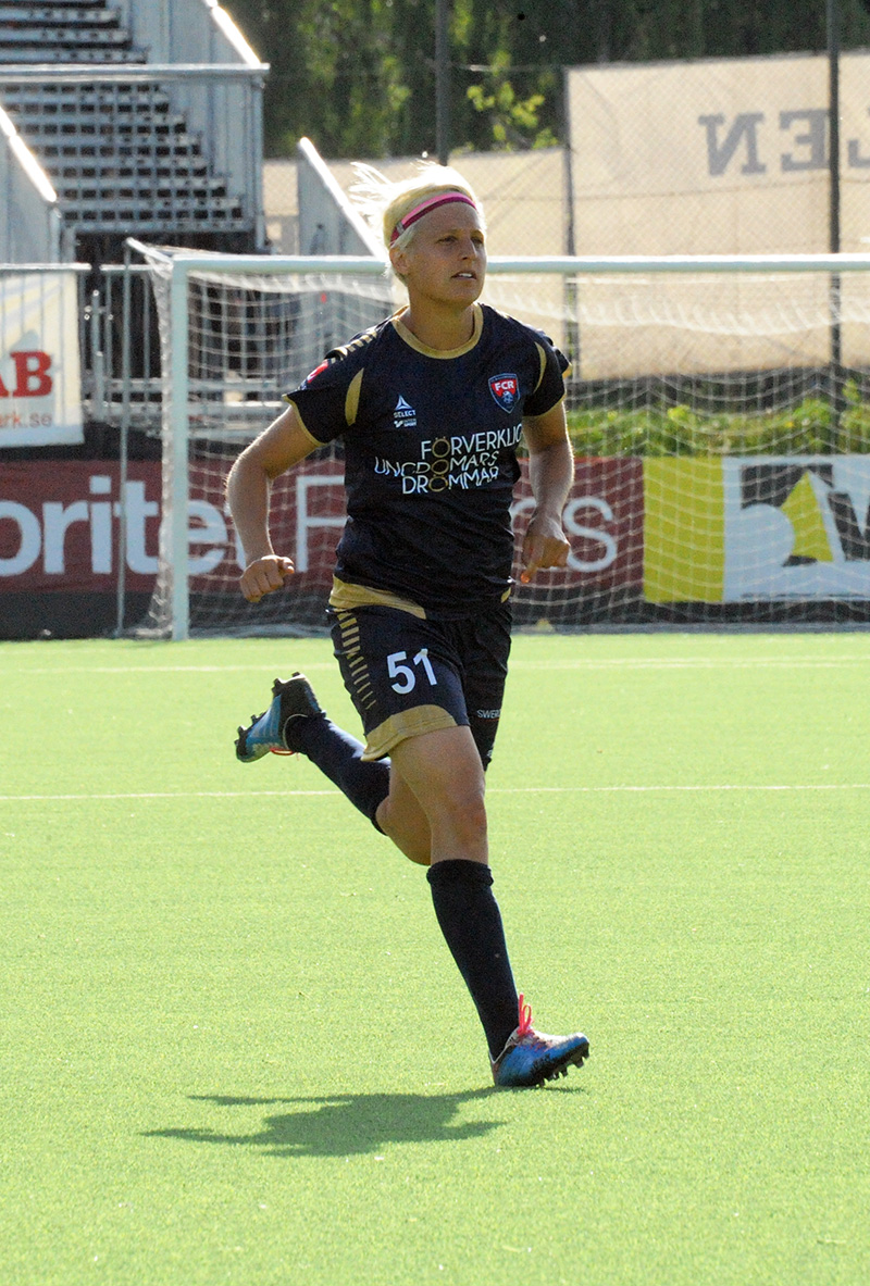 Lisa Ek (FC Rosengård)